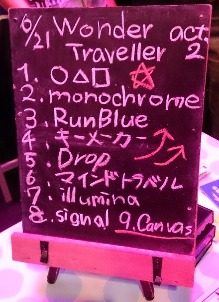 amiinaセトリボード(20150621(1))